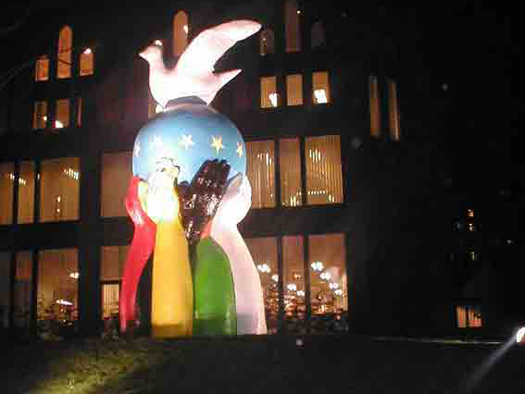 Statue of Europe Unity in Peace (European Commission Brussels) by Bernard Romain.